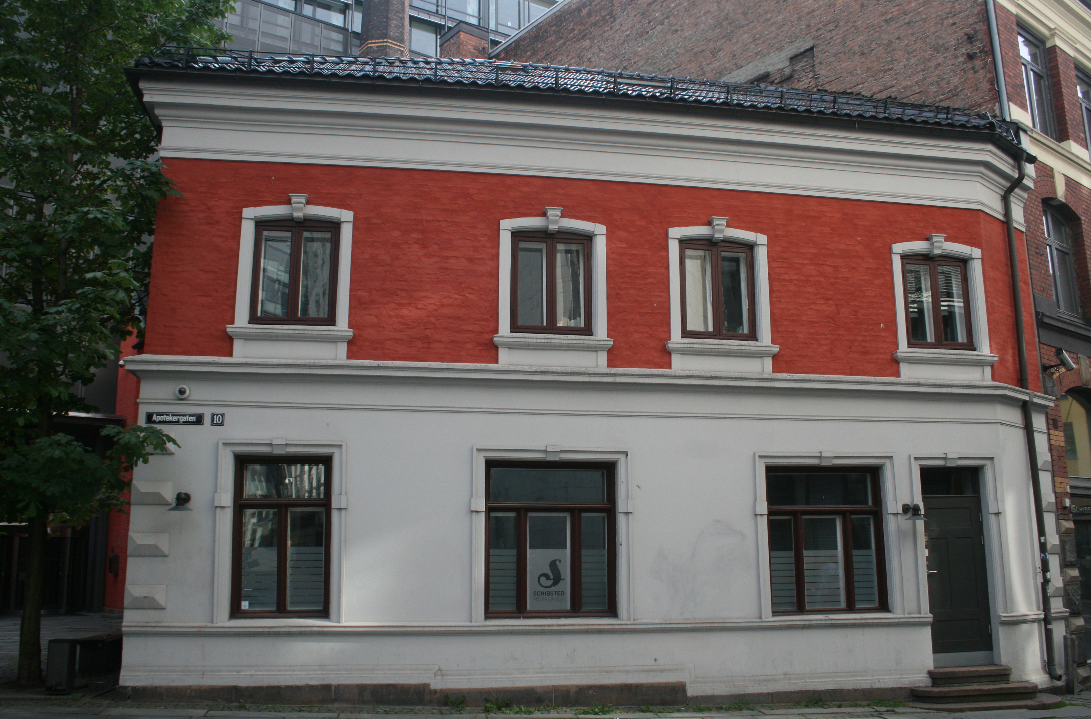 Apotekergata 10b i Oslo, fra ca 1860